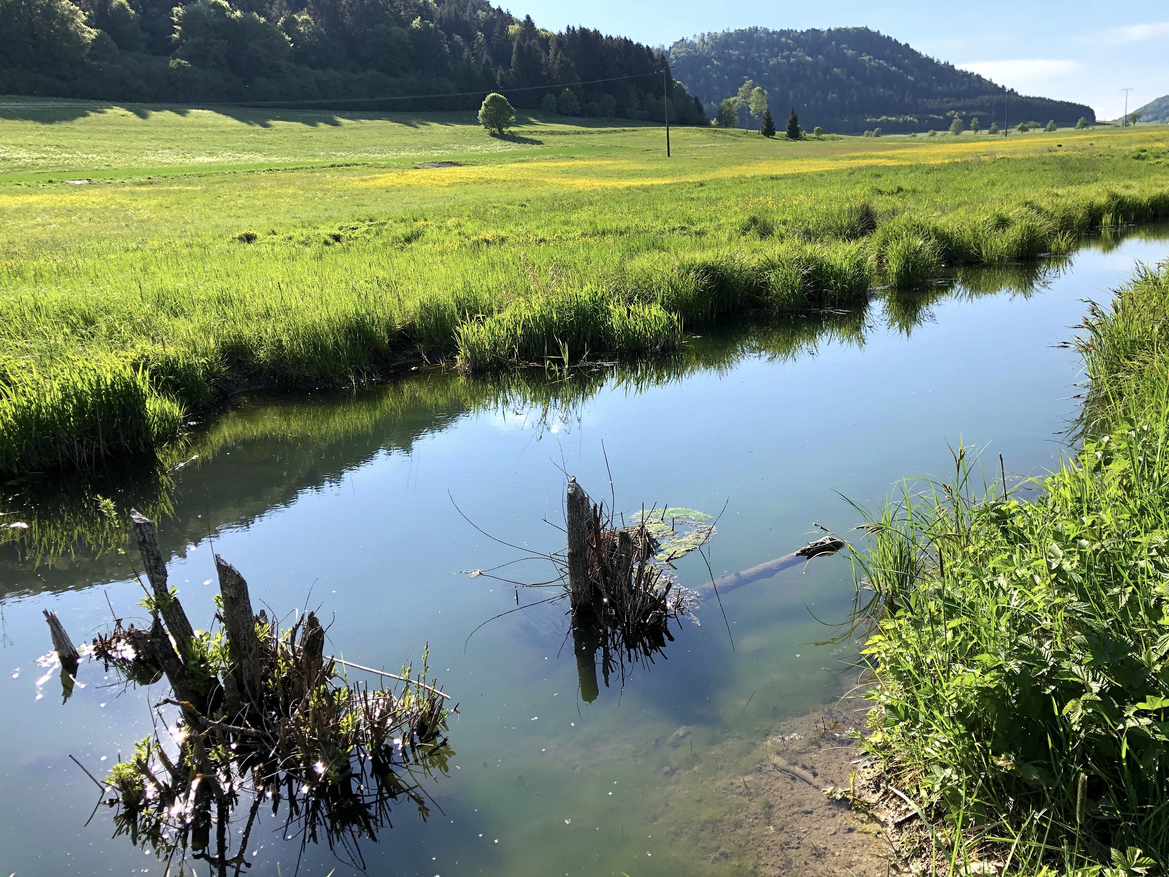 Obere Bära südlich Tieringen, Landschaftsschutzgebiet Großer Heuberg, Biotop Uferweidengebüsch entlang der Oberen Bära südl. Tieringen, Naturraum Hohe Schwabenalb, Vogelschutzgebiet Südwestalb und Oberes Donautal